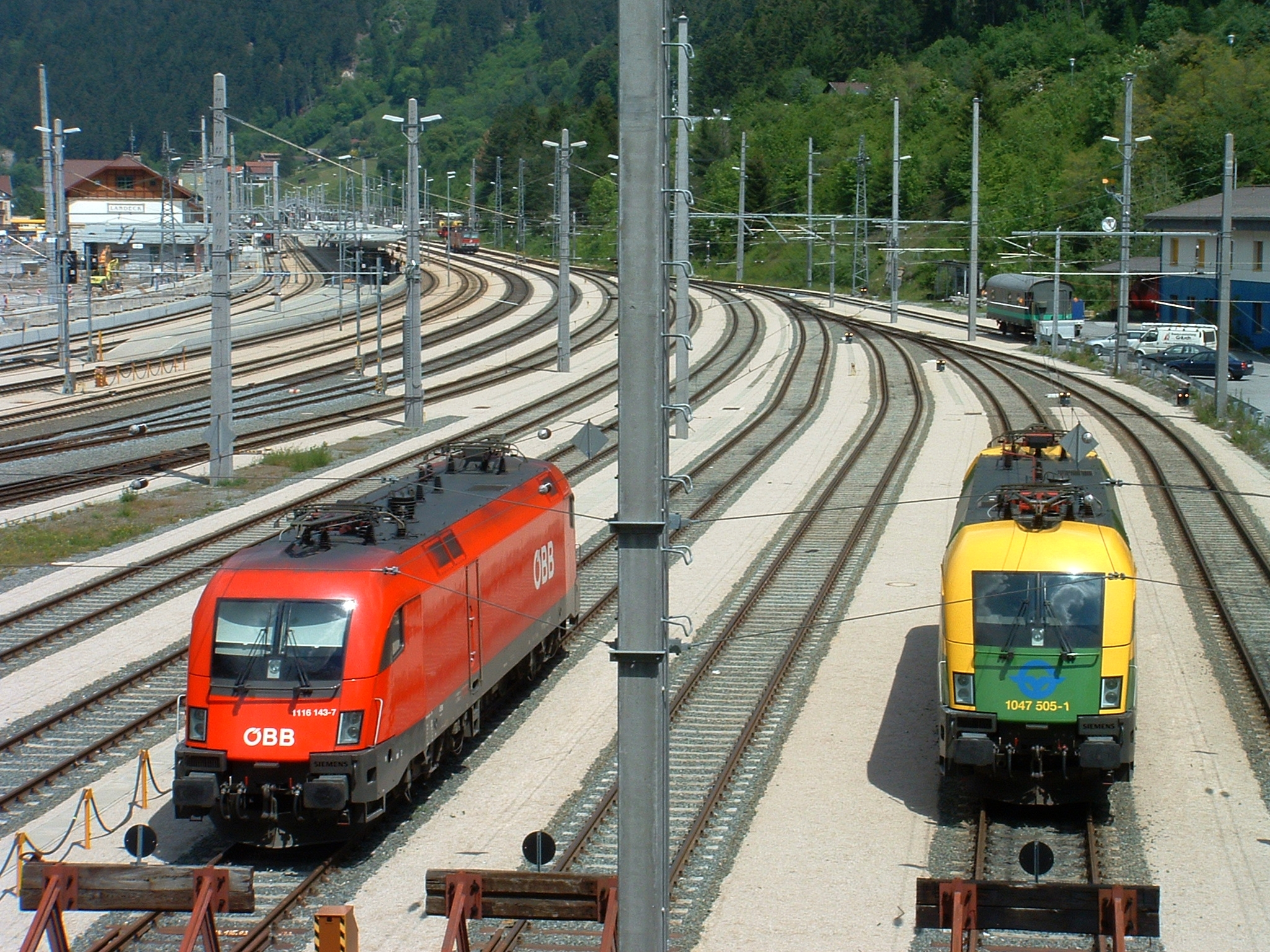 Abstellgruppe im Bahnhof Landeck-Zams mit einer ÖBB 1116 143-7 und GySEV 1047 505-1